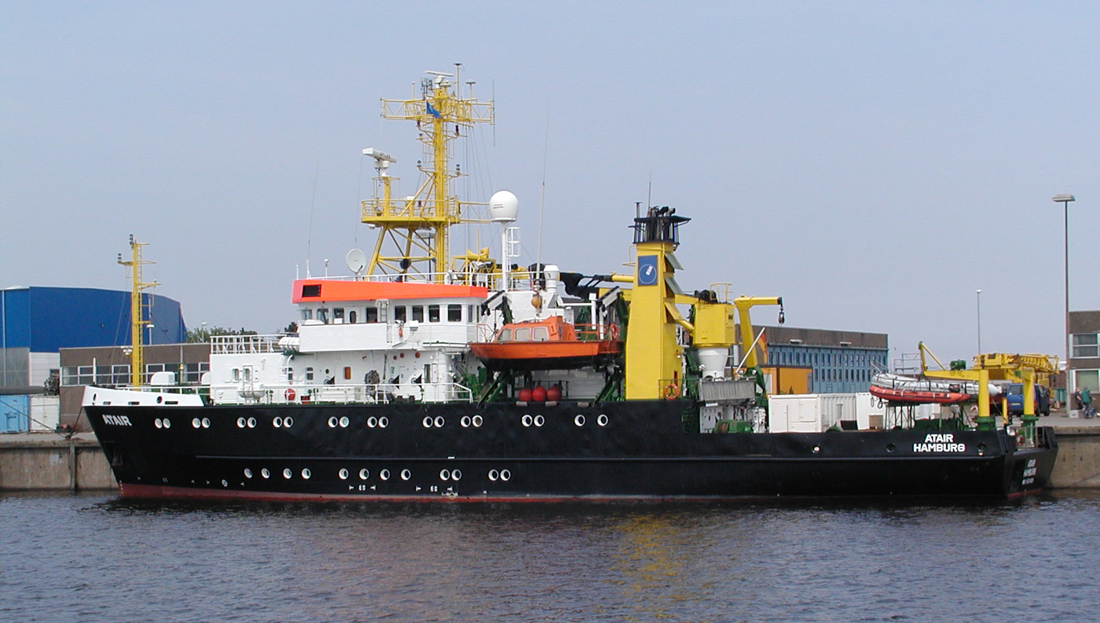 Das Schiff Atair aus Hamburg IMO Number: 8521426 MMSI Number: 211223460 Callsign: DBBI Length: 51 m Beam: 12 m